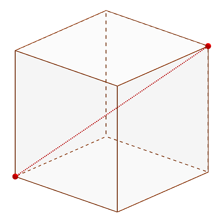 Úhlopříčka(tělesová) v krychli